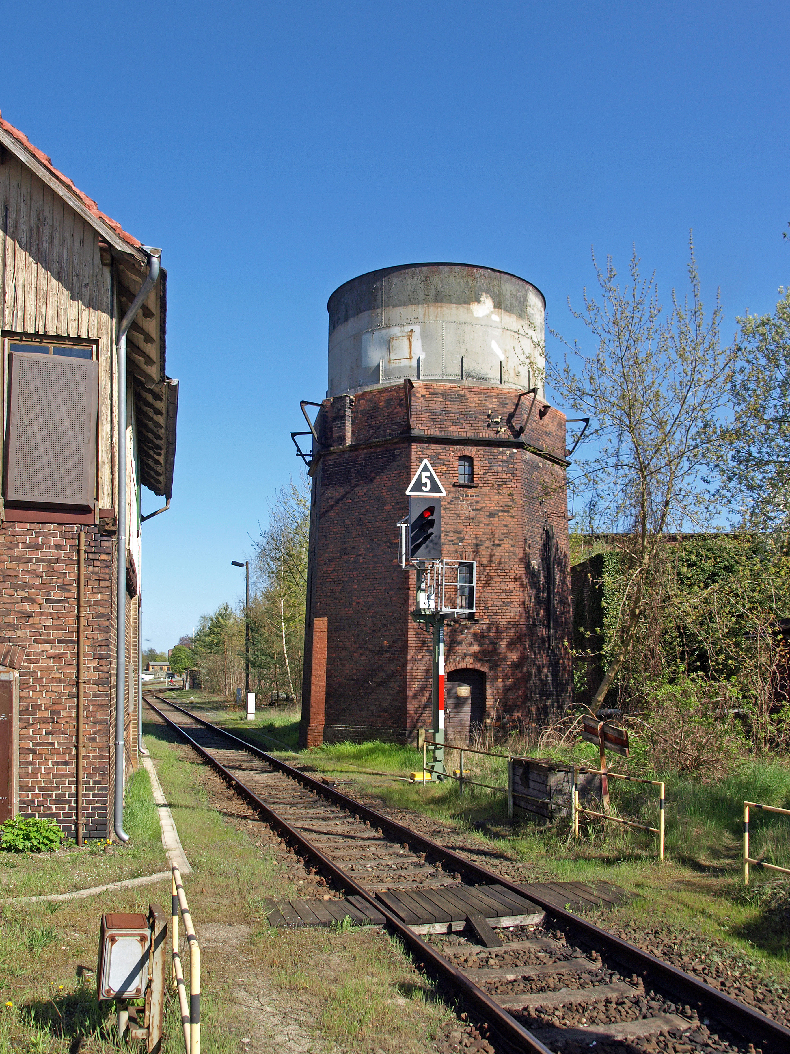 Wasserturm am Bahnhof Forst (Lausitz)